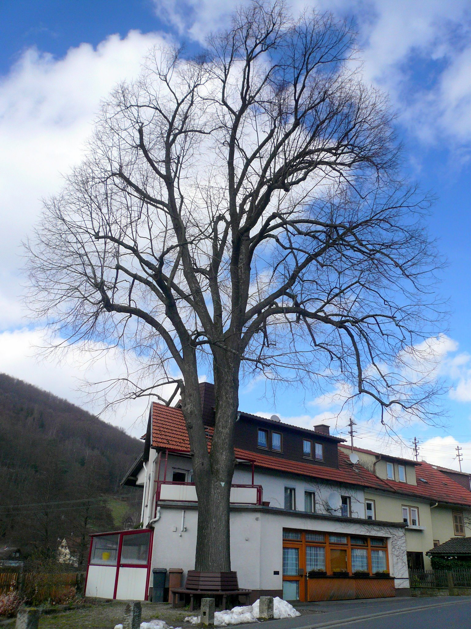 Dorflinde in Riedenberg